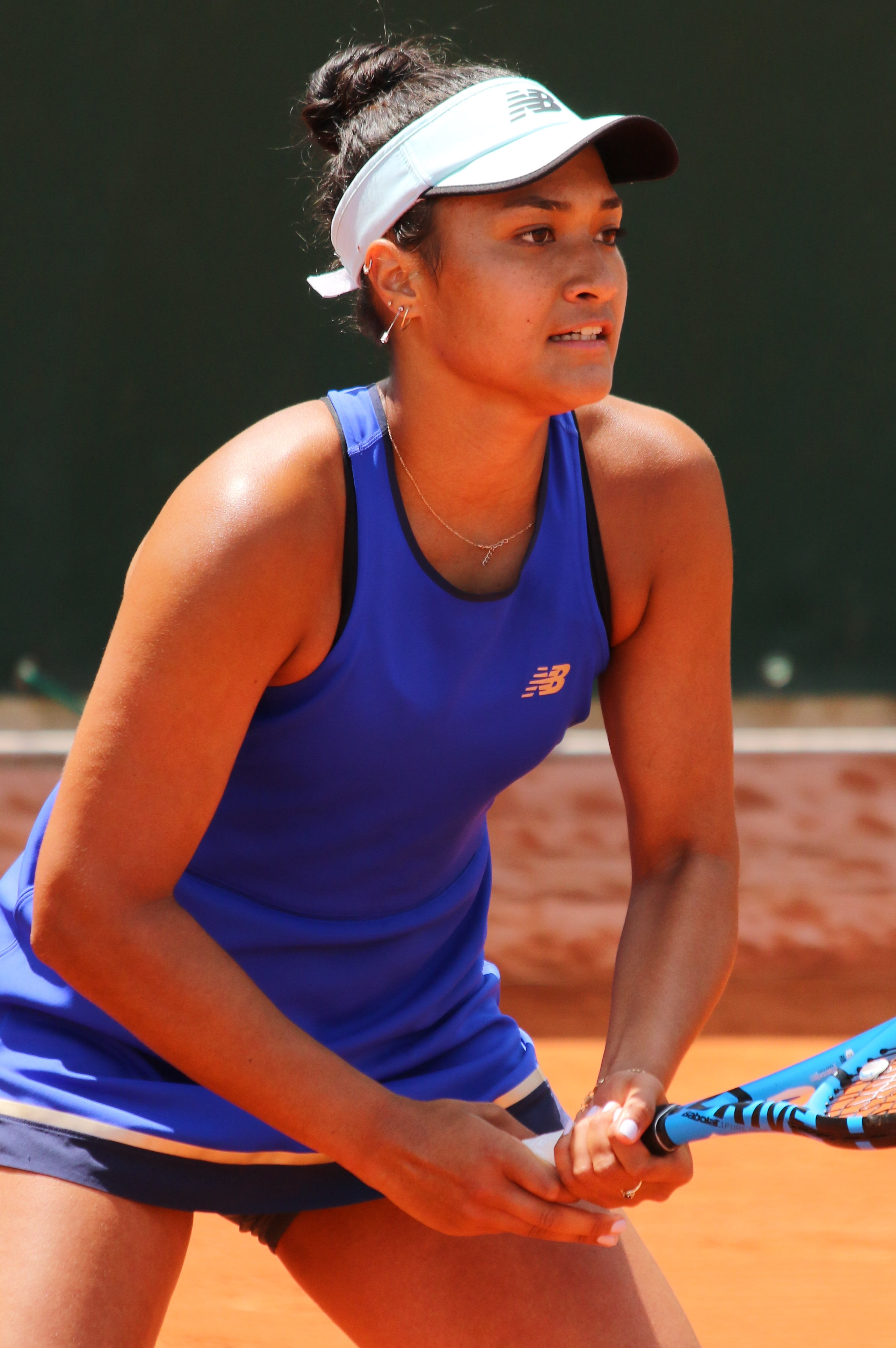 Halemai RG19 (10)